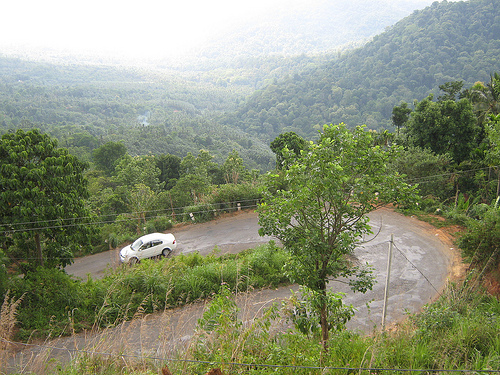 Palchuram, KottiyurRoad, Boys Town, Mananthawady, Kerala, India.